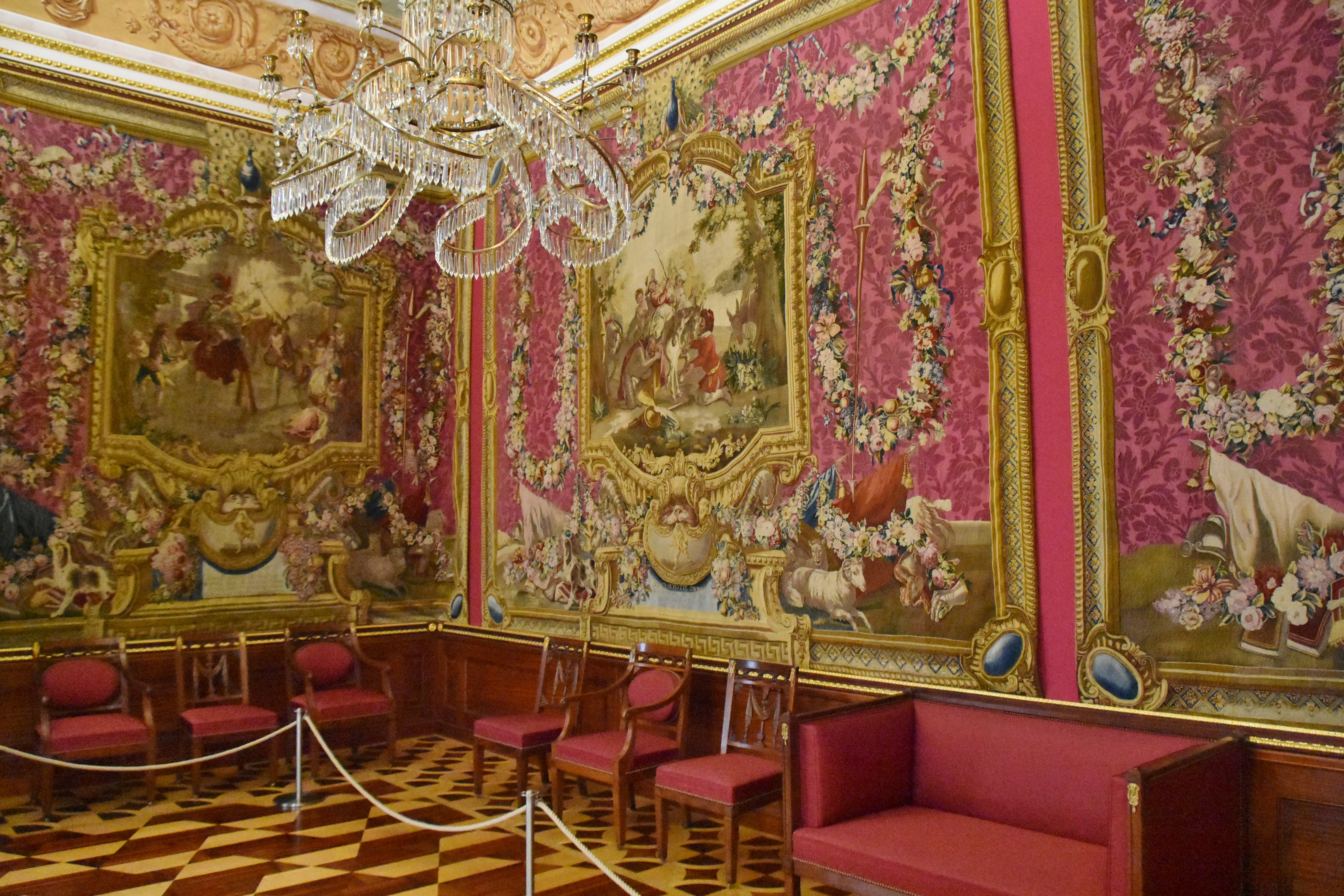 Charlottenburg Palace, 1695-1746, Berlin (85)